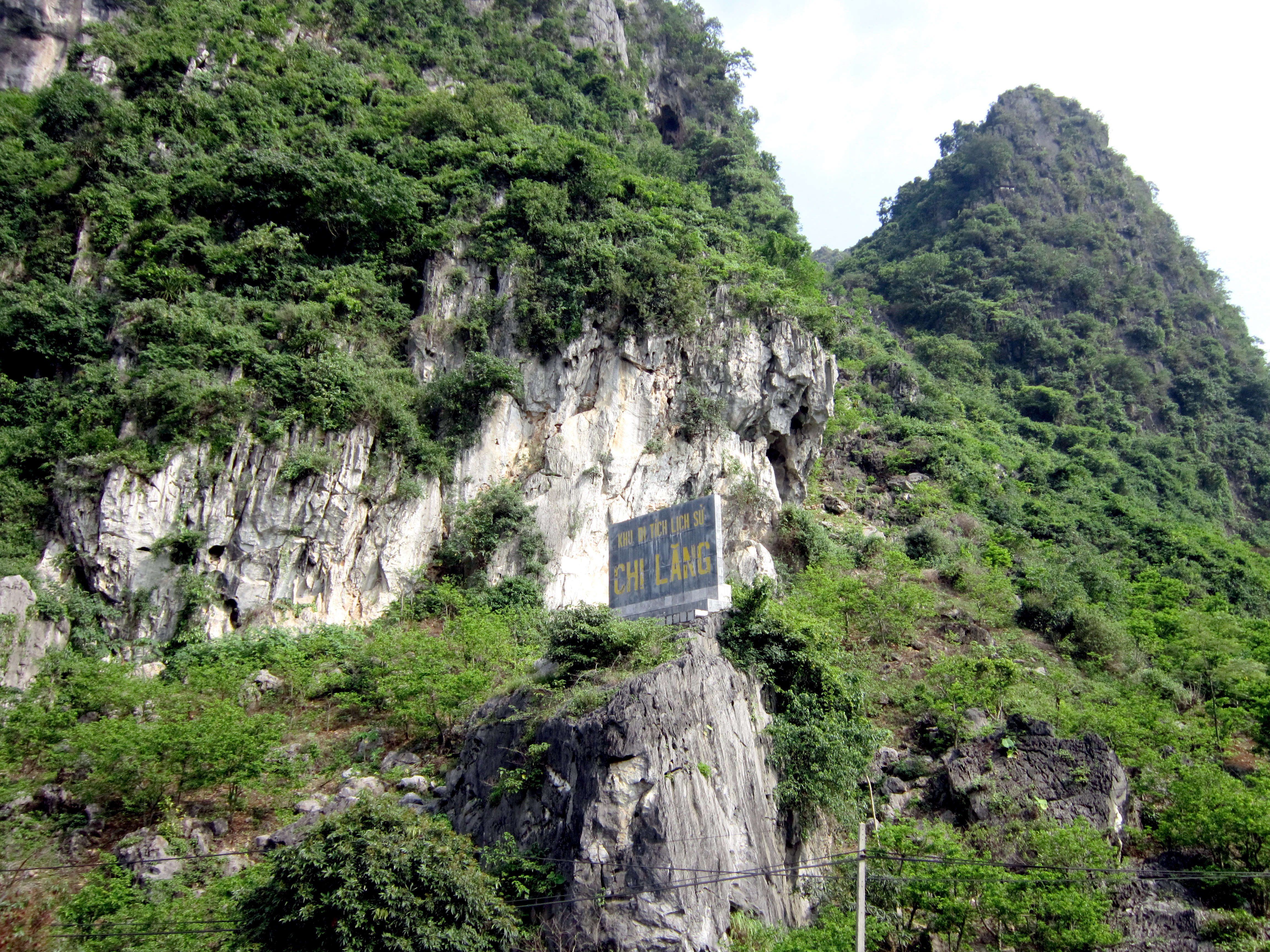 Ải Chi Lăng là một ải xưa; nay thuộc xã Chi Lăng, huyện Chi Lăng, tỉnh Lạng Sơn, Việt Nam.